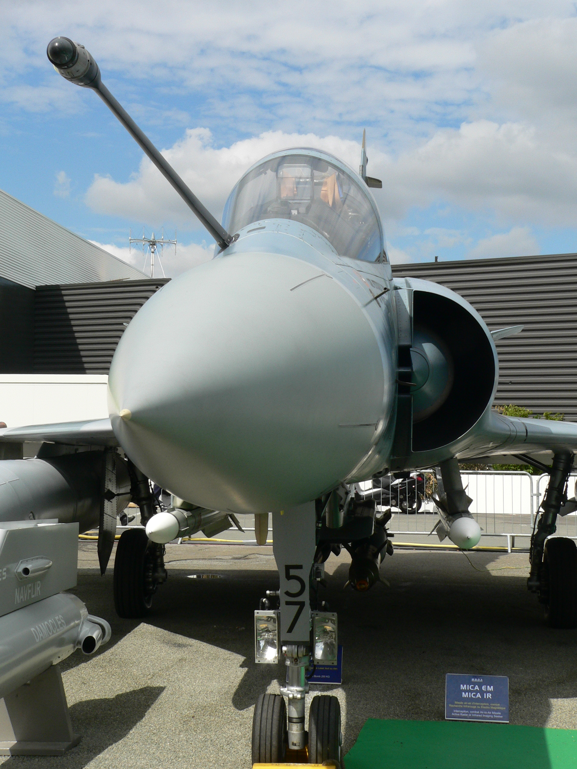 Dassault Mirage 2000 on a Dassault Rafale Marine